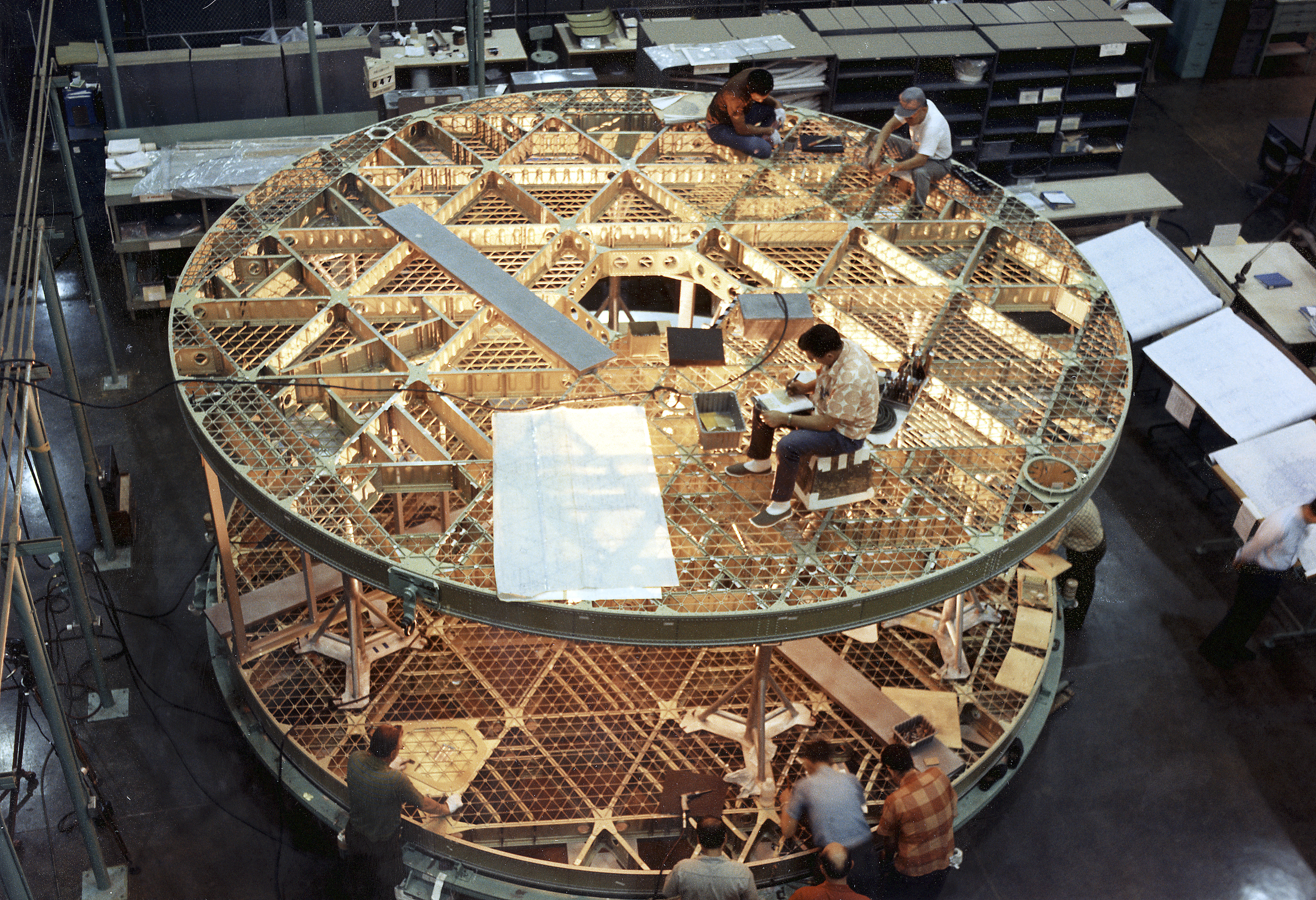 Assembling the Skylab Orbital Workshop